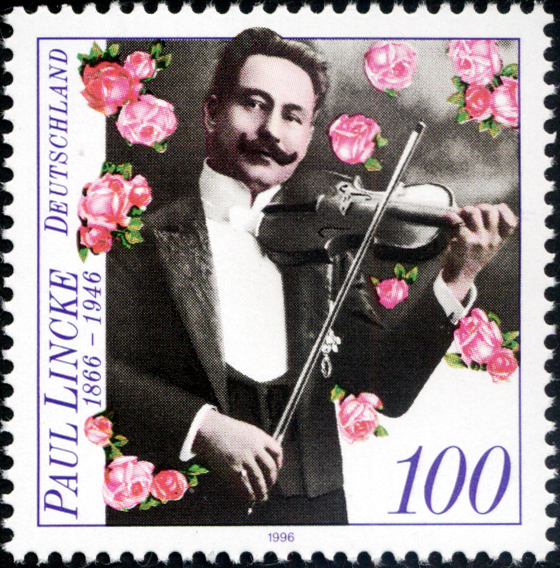 Paul Lincke (1886–1946), compositeur allemand